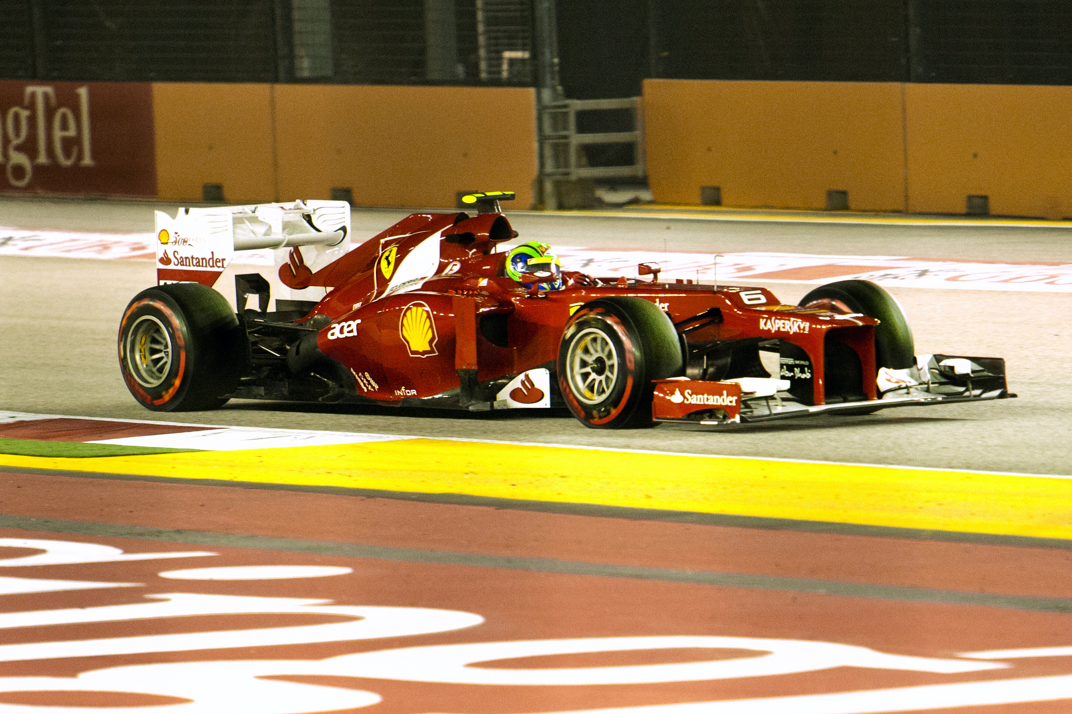 Massa